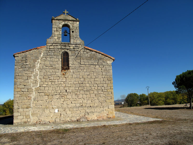 Ermita de San Antón en el pueblo de La Nave (Miranda de Ebro, España)